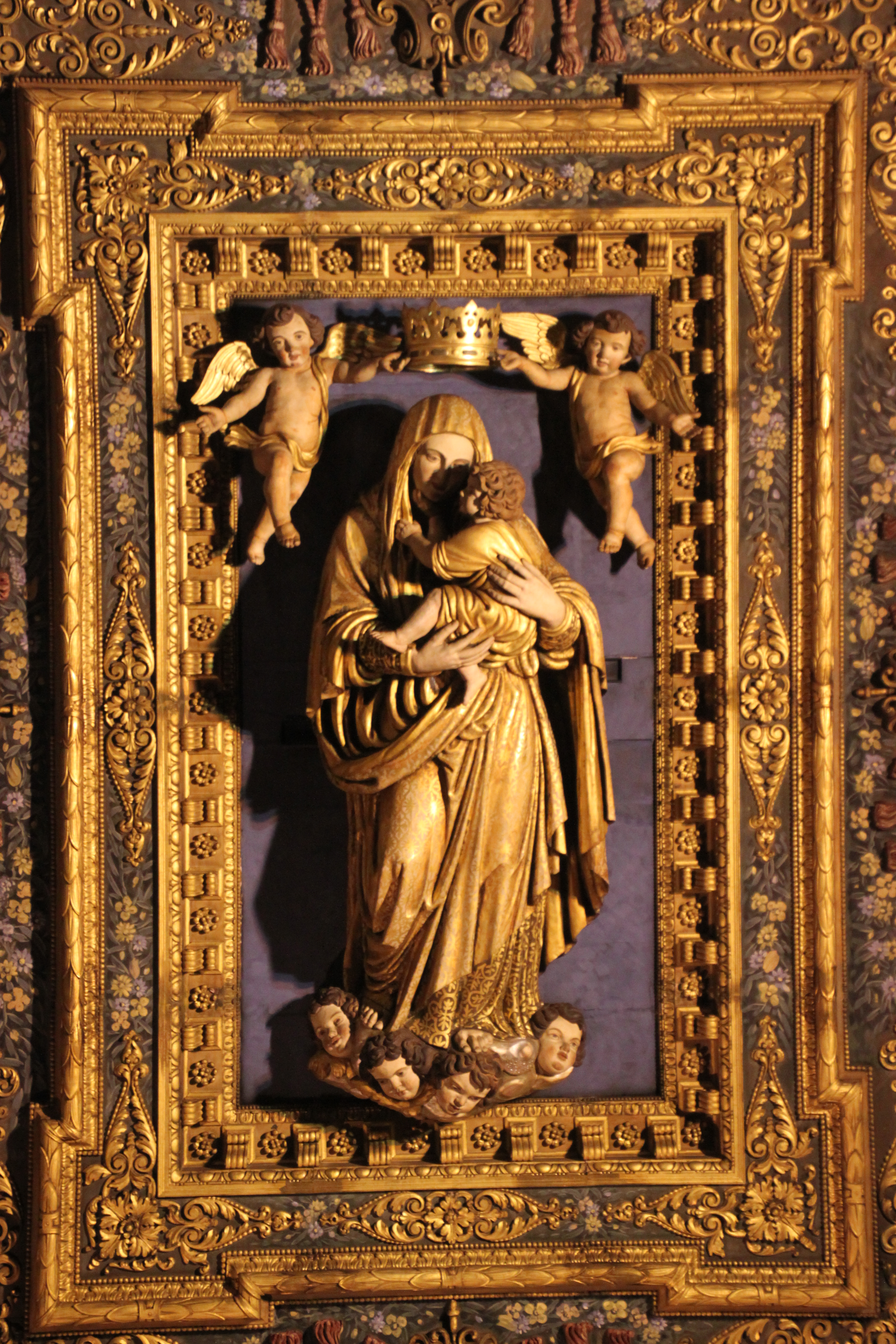 Detail der Decke in Santa Maria del Carmine Maggiore in Neapel